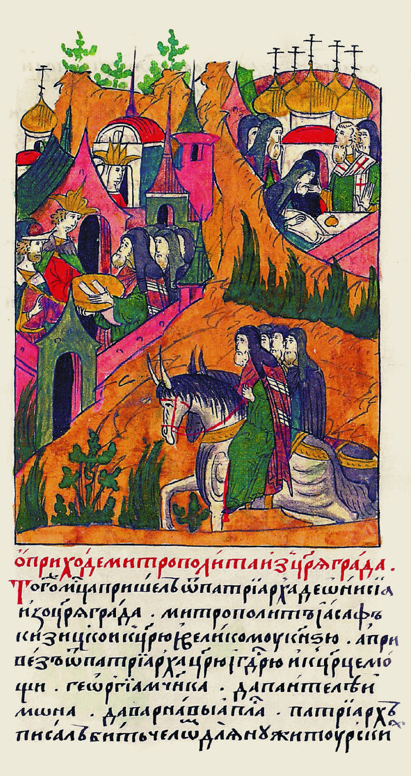 Лицевой летописный свод "О приходе митрополита из Цареграда. В тот же месяц пришел от патриарха Дионисия из Цареграда митрополит Иоасаф кизицкий к царю и великому князю, а привез от патриарха к царю государю и к царице мощи мученика Георгия, да Пантелеймона, да Варнавы апостола. Патриарх прислал бить челом из-за нужды от турков [о милостыни. Да говорил митрополит царю и государю от Дионисия патриарха, что патриарх Дионисий константинопольский, архиепископы и епископы и со всем цареградским собором уложили соборно молить Бога о царе и великом князе Иоанне Васильевиче всея России, как и о прежних благочестивых царях, и руками своими утвердили, что им вовеки поминать и молить Бога о царе Иоанне, а кто не станет молить, тому в отлучении быть]."